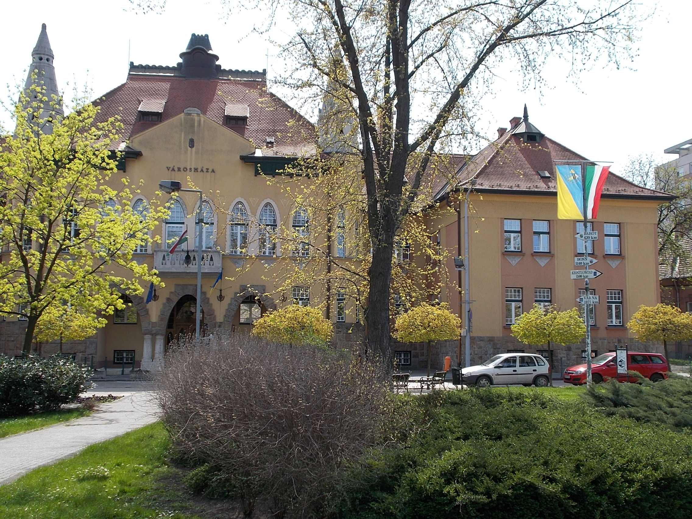 A Városháza műemlék épülete. ID 1288. A Brázay-féle sósborszeszgyár (1901) épületének átalakításával készült. - Budapest, 22. kerület. Budafok. Városház tér. 11-13.